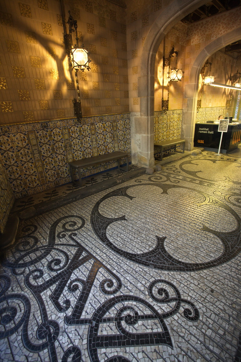 Palau del Baró de Quadras (Barcelona)